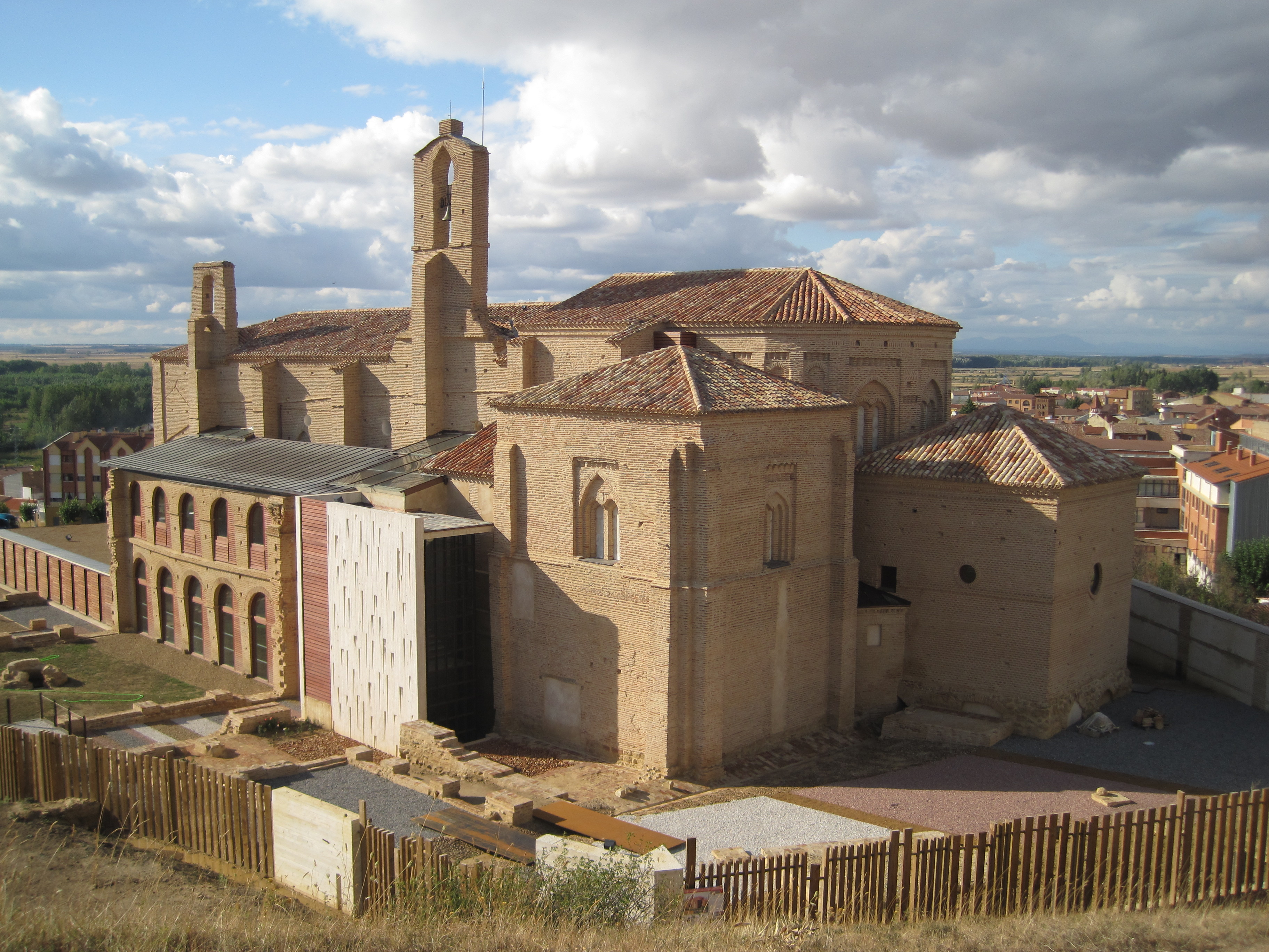 Iglesia de la Peregrina, en Sahagún (León, España) tras su reforma en 2011.